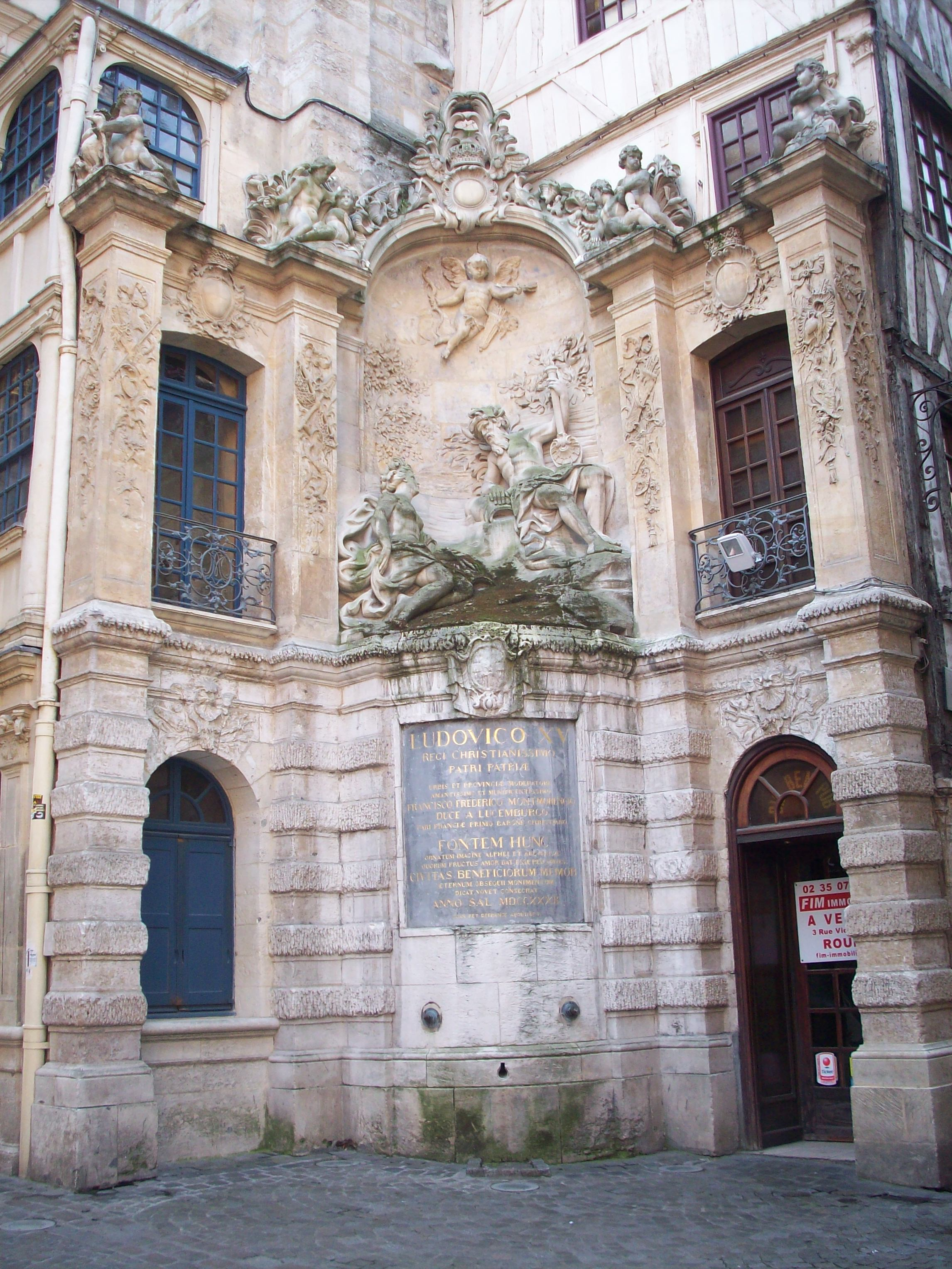 Fontaine du Gros-Horloge.